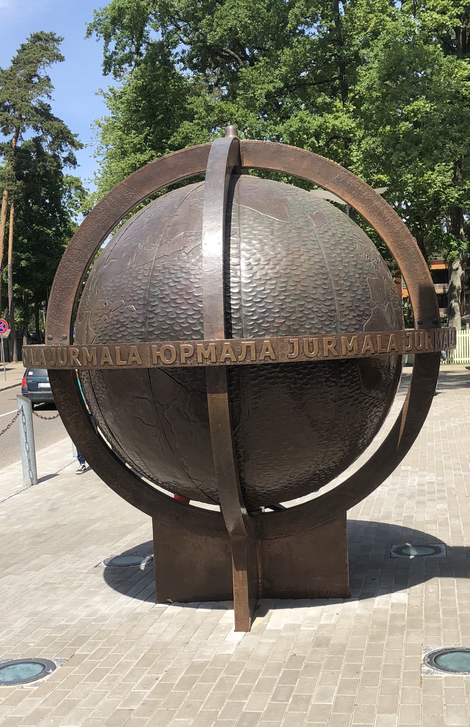 Jurmala-Globus in Riga-Strand